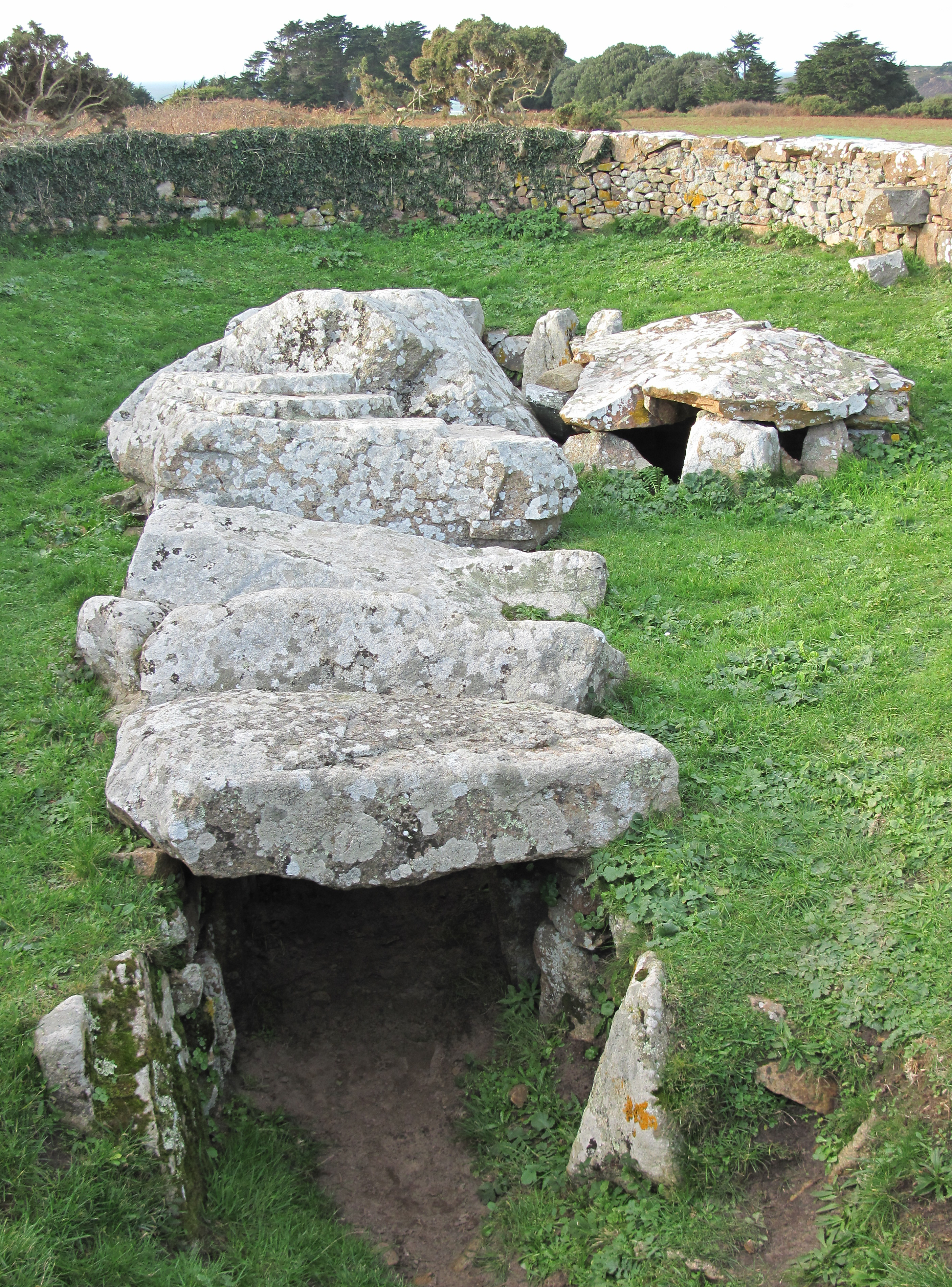 Nrf: Pouquelaye des Monts, Grantez, Saint Ouën, Jèrri